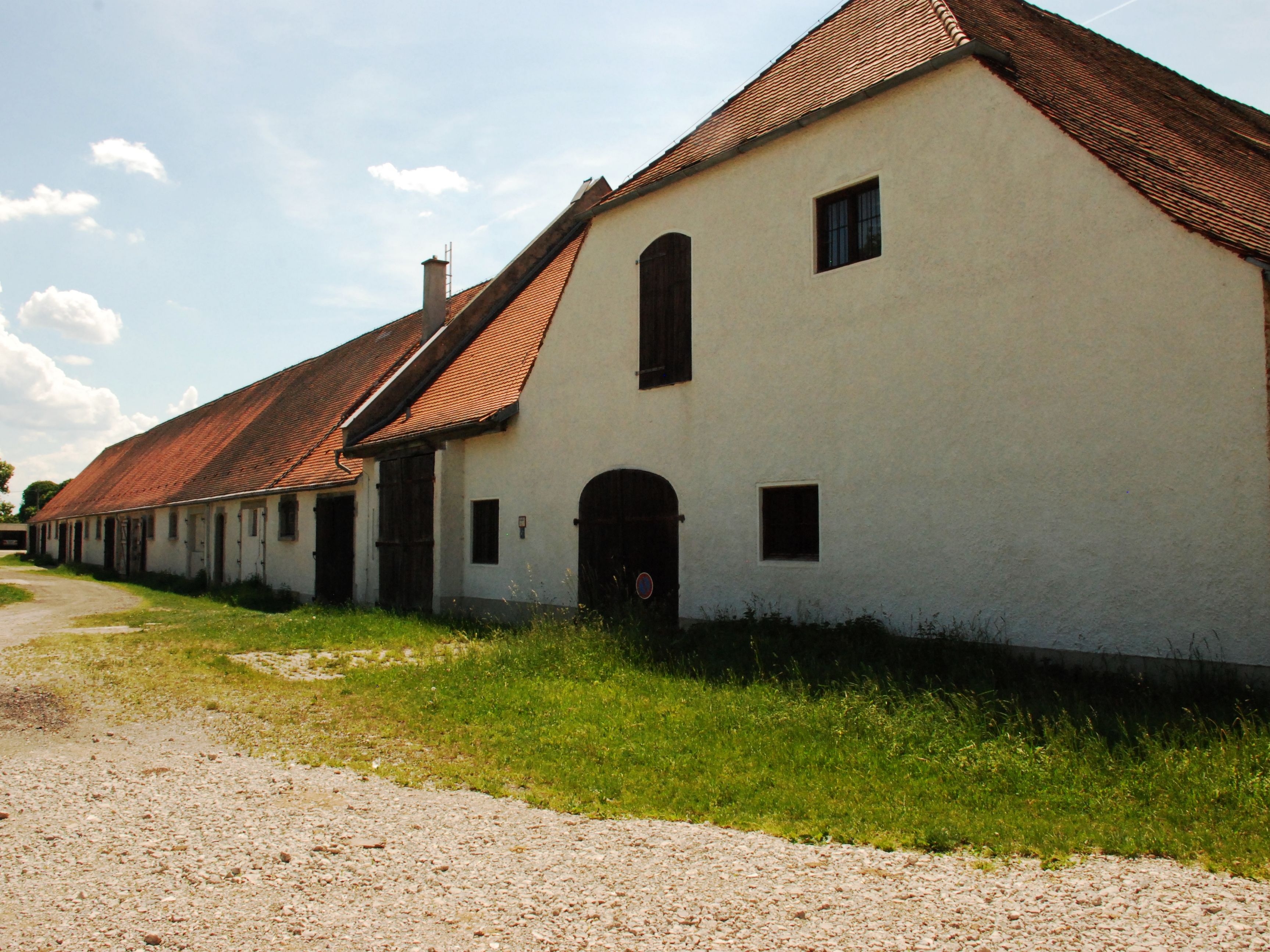 Denkmalgeschützte Gutsanlage Hochmutting, Gemeinde Oberschleißheim, Landkreis München